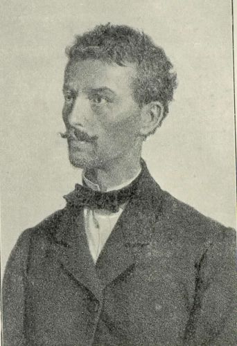 Mihael Hermann (1822-1883), Slovene politician.